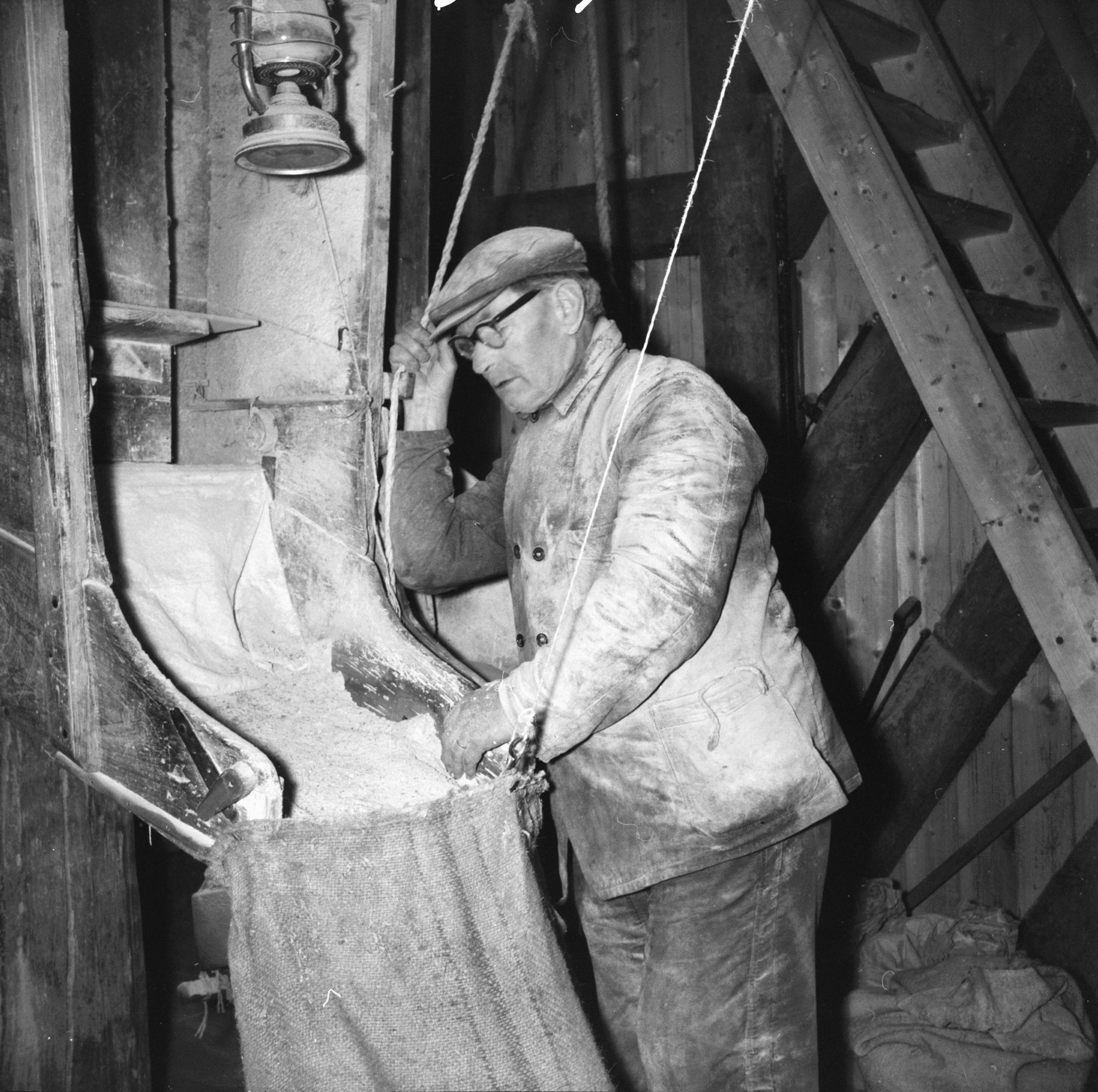 Diversen: "Den Hoed", molenaar bij maalbak